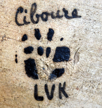 tapon permettant aux collectionneurs de repérer les vases de la poterie